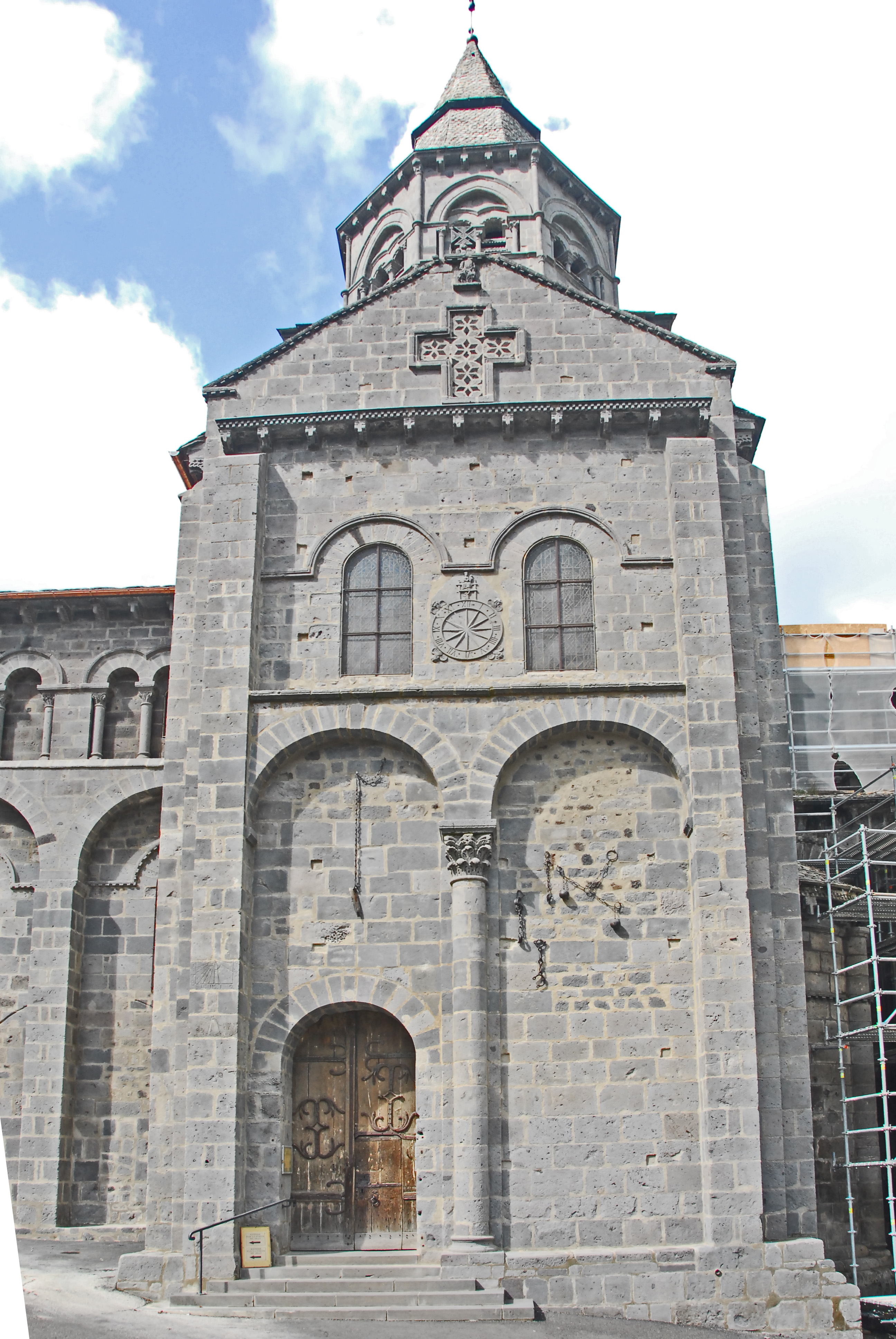 N.-D.d'Orcival, Querhaus, Südgiebel